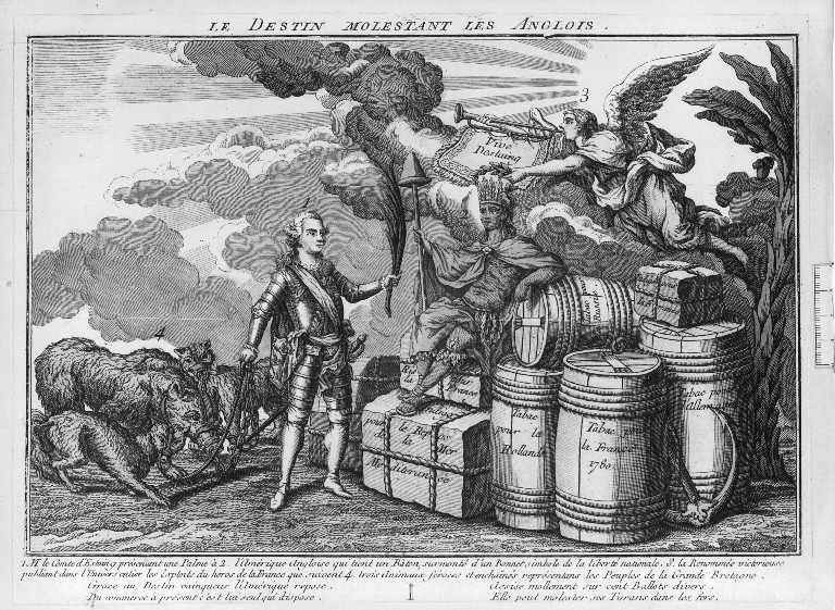 Le destin molestant les Anglois, 1780 M. le Comte d'Estaing présentant une Palme à l'Amérique Angloise qui tient un Bâton, surmonté d'un Bonnet simbole de la liberté nationale. la Renommée victorieuse publiant dans l'Univers entier les Exploits du héros de la France que suivent trois animaux féroces et enchaînés représentans les Peuples de la Grande Bretagne." Suivent quatre vers sur deux colonnes, deux et deux : "Grace au Destin vainqueur l'Amérique repose, Du commerce à présent c'est lui seul qui dispose. Assise mollement sur cent Ballots divers Elle peut molester ses Tyrans dans les fers." De gauche à droite, un ours et deux renards muselés et tenus en laisse par d'Estaing en cuirasse, une palme à la main. L'Amérique sous les traits d'un Peau-Rouge assis sur divers ballots et tonneaux portant les étiquettes suivantes : "Ris pour la France - Indigo pour le Repos de la Mer Mediteranée. - Tabac pour la Hollande - Tabac pour la Russie - Tabac pour la France 1780 - Indigo pour la France - Tabac pour l'Allemagne." Au-dessus de l'Amérique, planant sur les nuages, la Renommée soufflant dans une trompette garnie d'un tablier sur lequel on lit : "Vive Destaing" . Notice n° : FRBNF41512481.